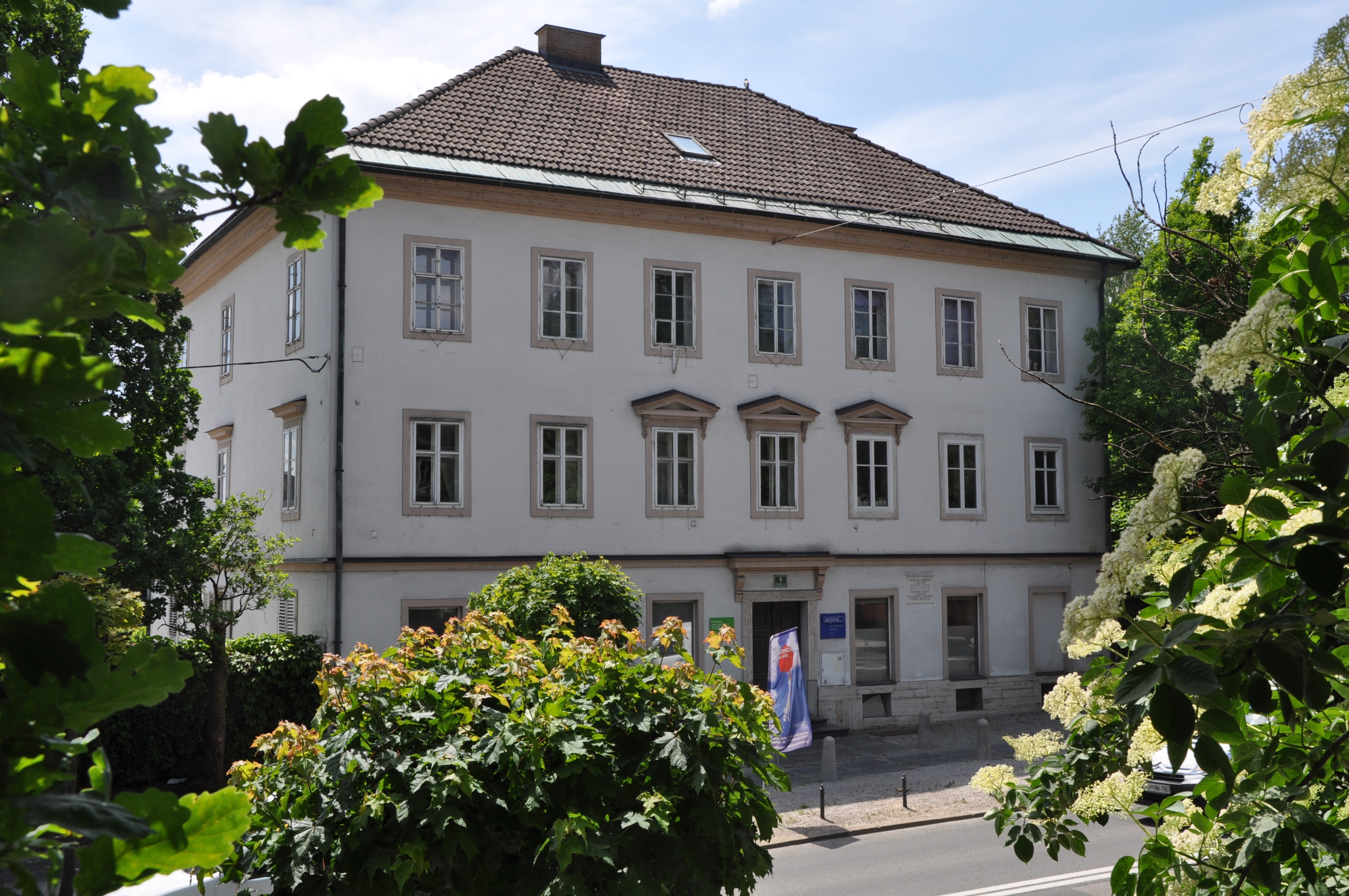 Zoisova cesta, Ljubljana - Štritof house